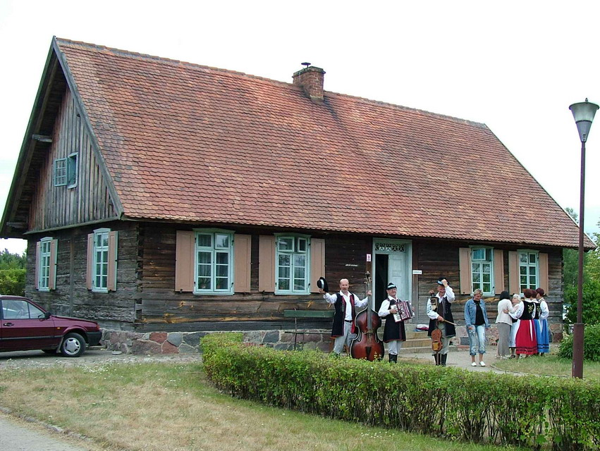 Kaszubski Park Etnograficzny we Wdzydzach Kiszewskich - drewniany dworek z lat 50-tych XIX w. przeniesiony ze wsi Raduń (pierwotna własność Lew-Kiedrowskich)